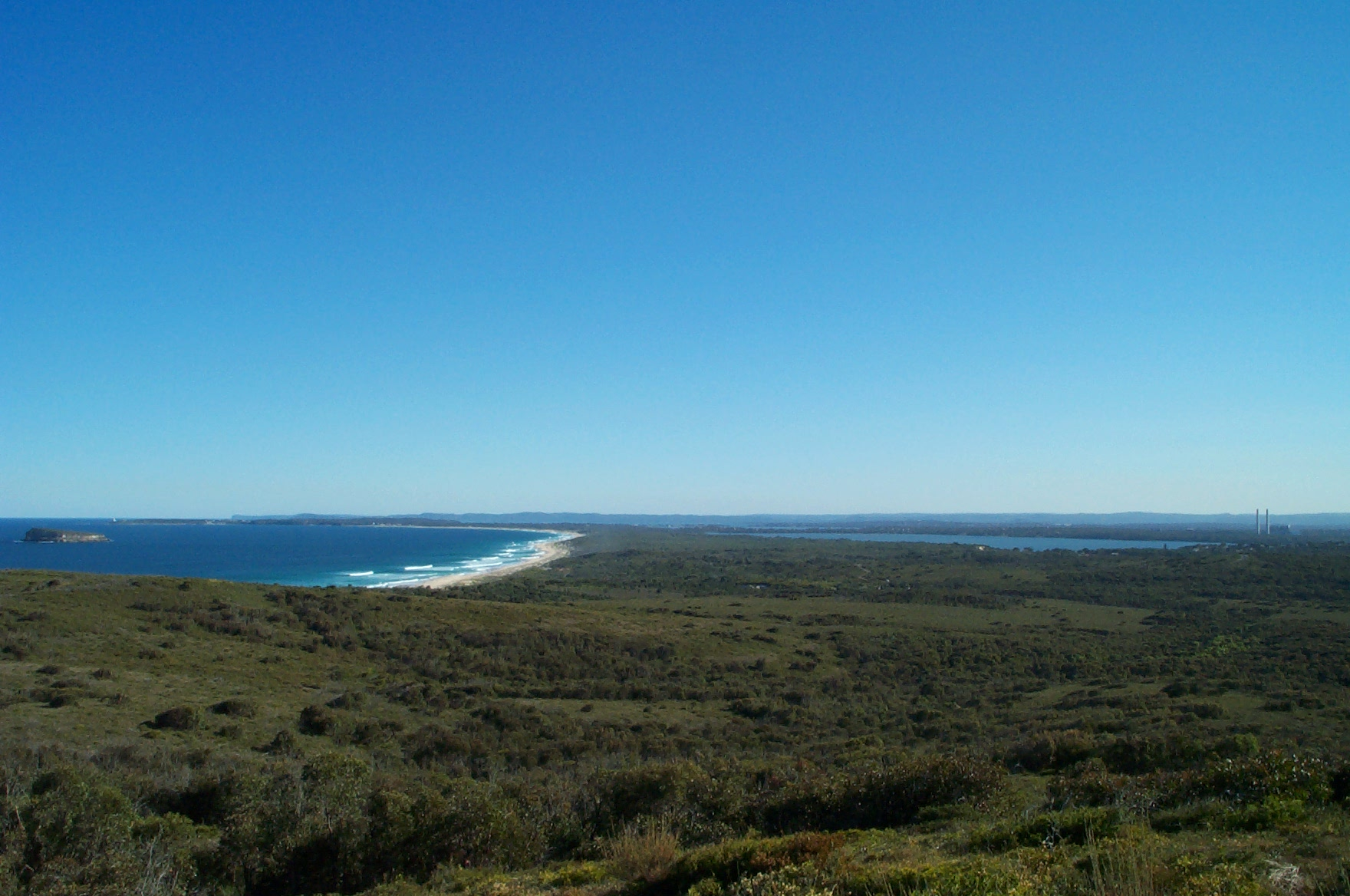 Birdie Beach and Lake Munmorah